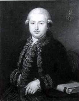 Johann Jakob von Wittgenstein um 1780